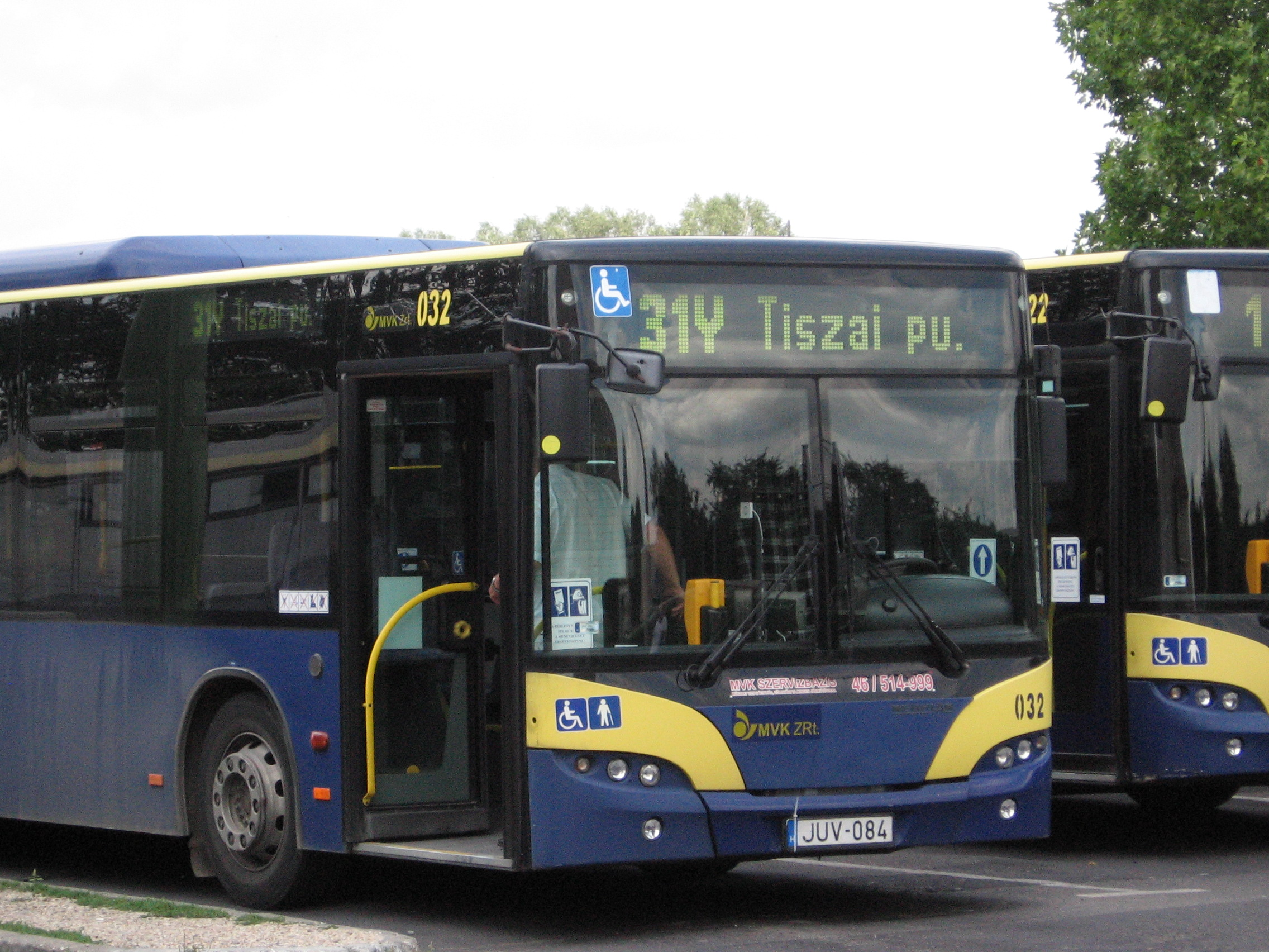 Miskolc 31Y-os jeltésű járatán egy Naoplan busz